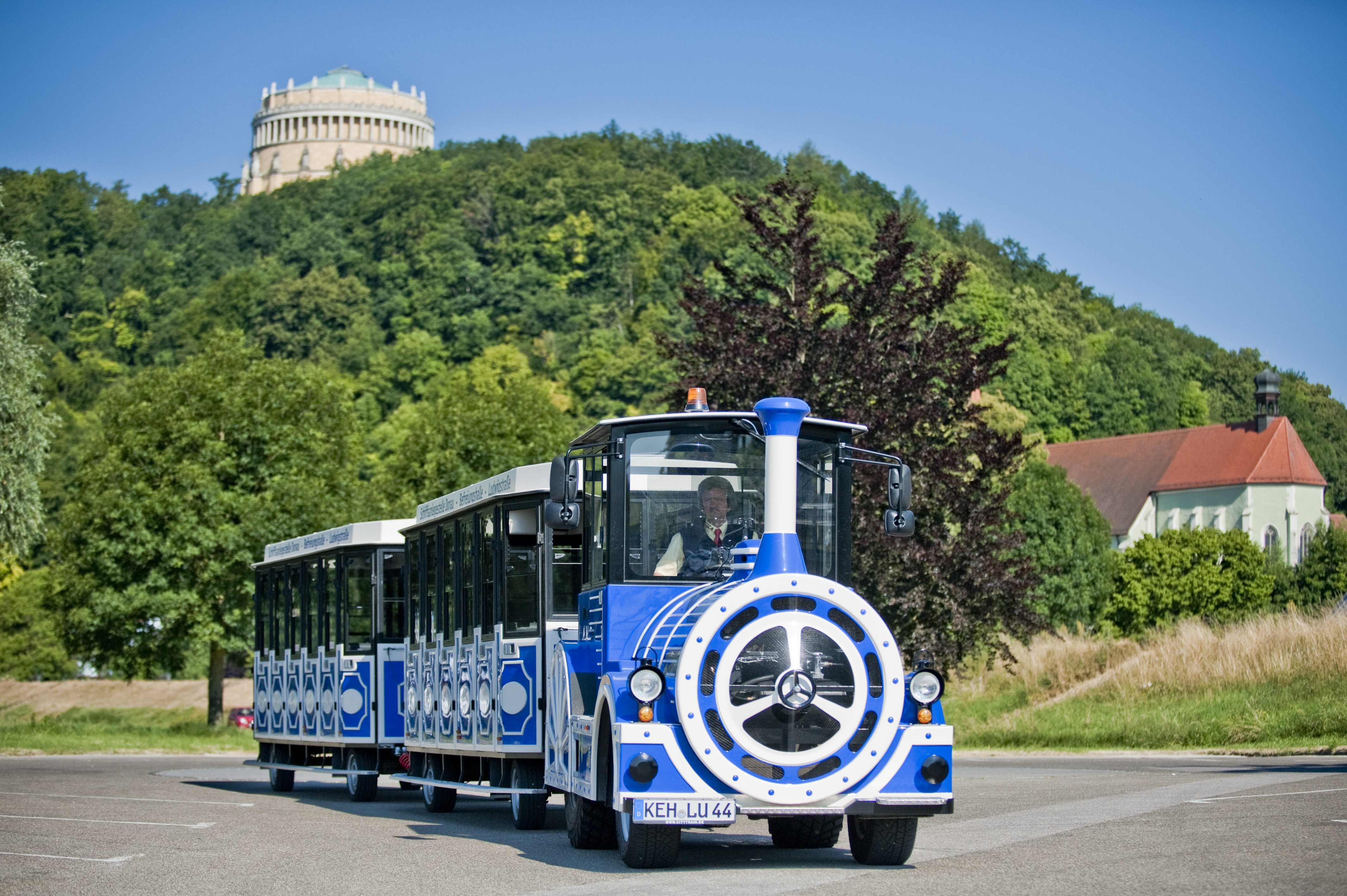 Die Ludwigsbahn am Anleger Donau. Im Hintergrund die Befreiungshalle.